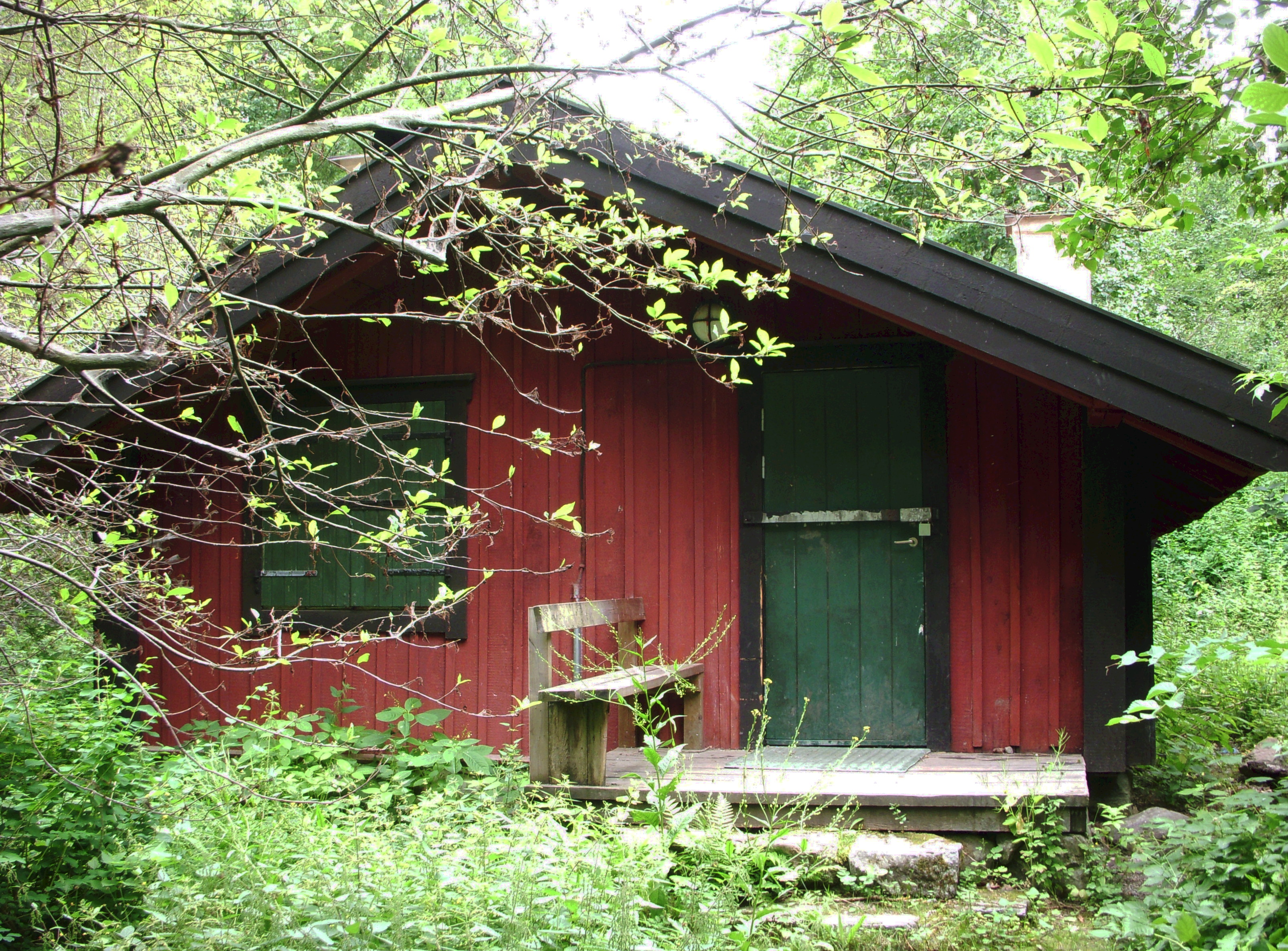 Torpet Lugnet vid Judarn, Bromma